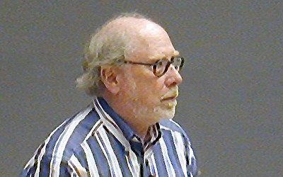 Graf von dem Bergh, Fotografie Niklaus Wirth, Entwickler der Programmiersprache Pascal